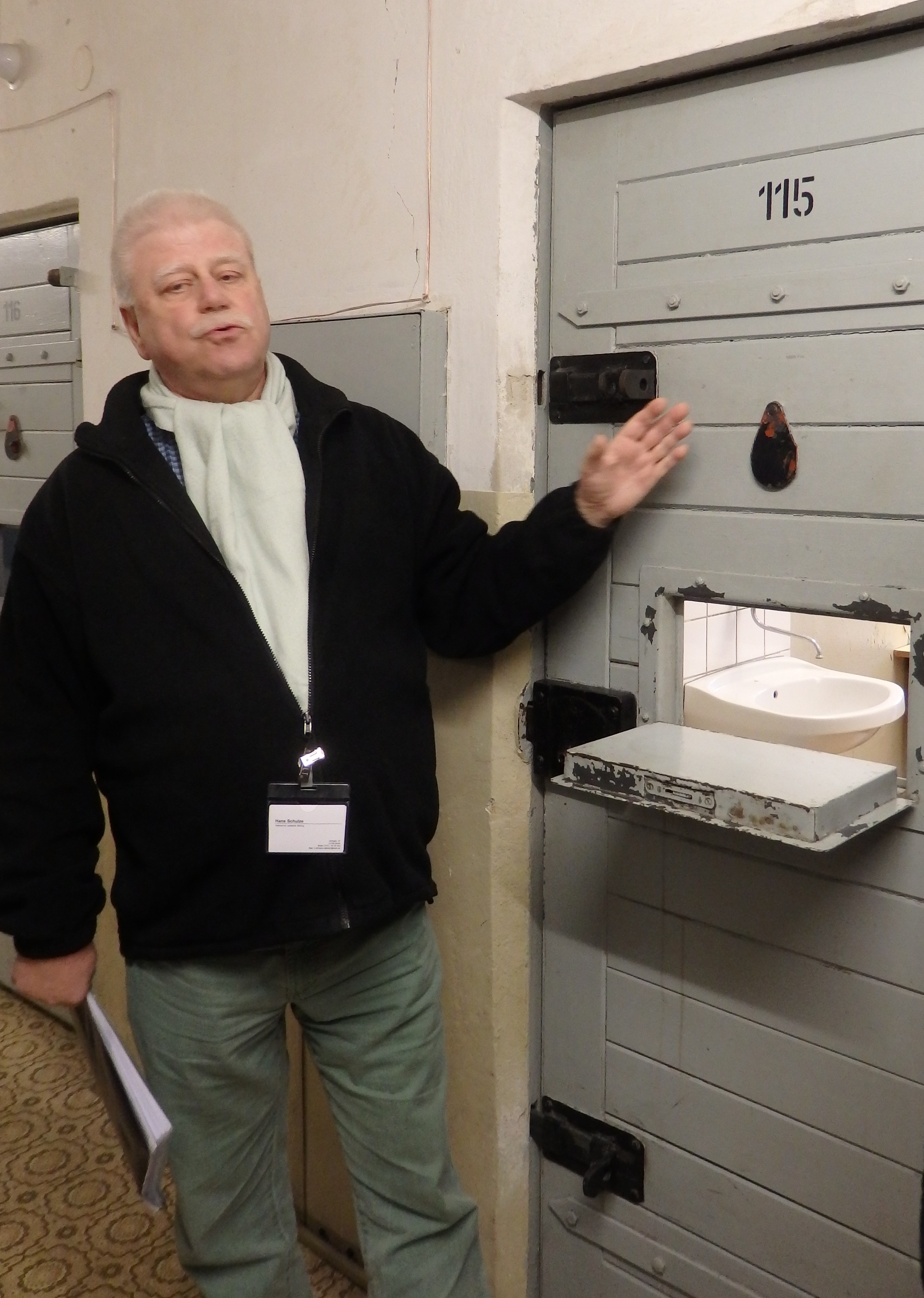 Hans Schulze, am 04.02.2017 vor seiner Zelle